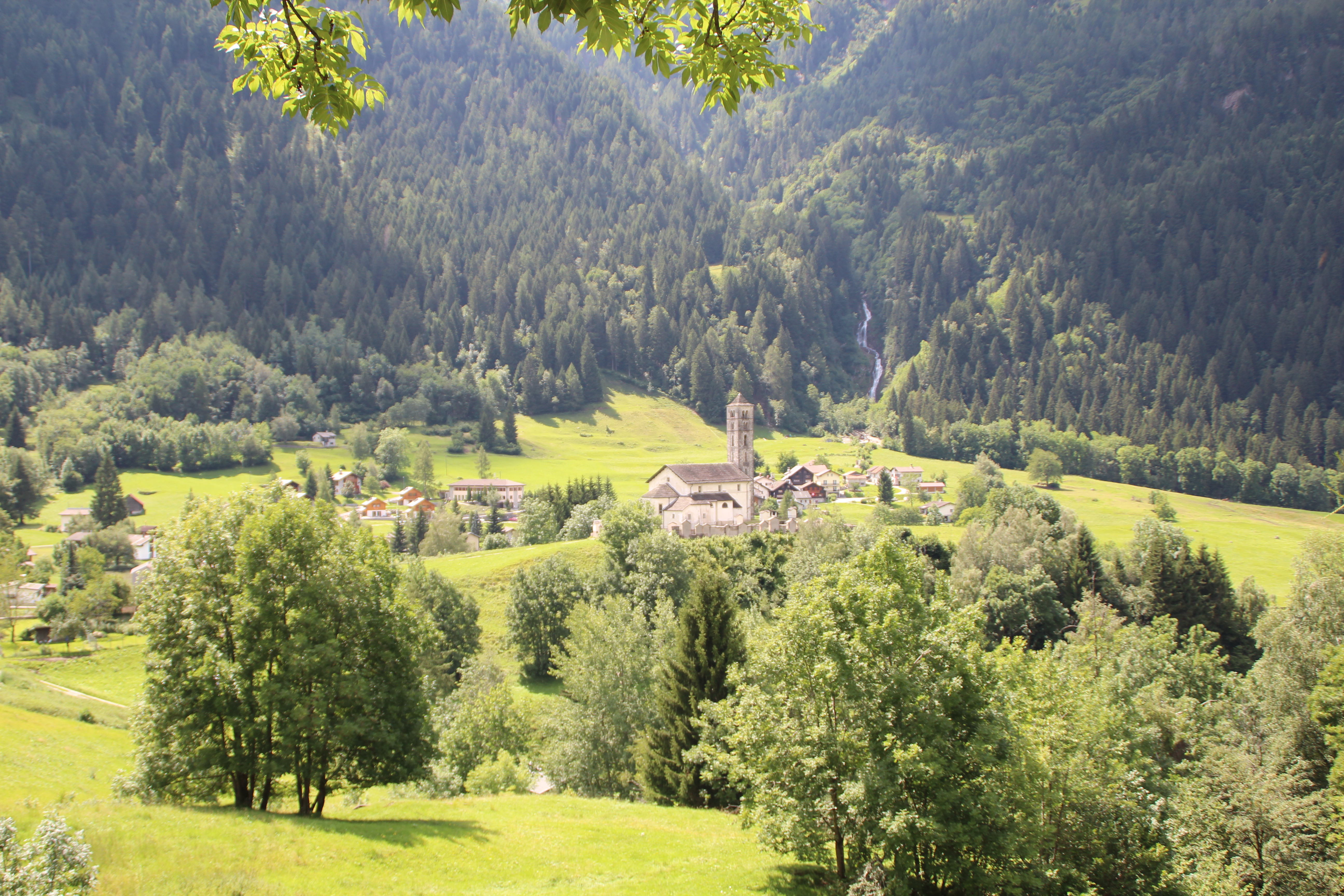 Prato (Leventina)